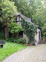 Kolliger Muehle Gästehaus